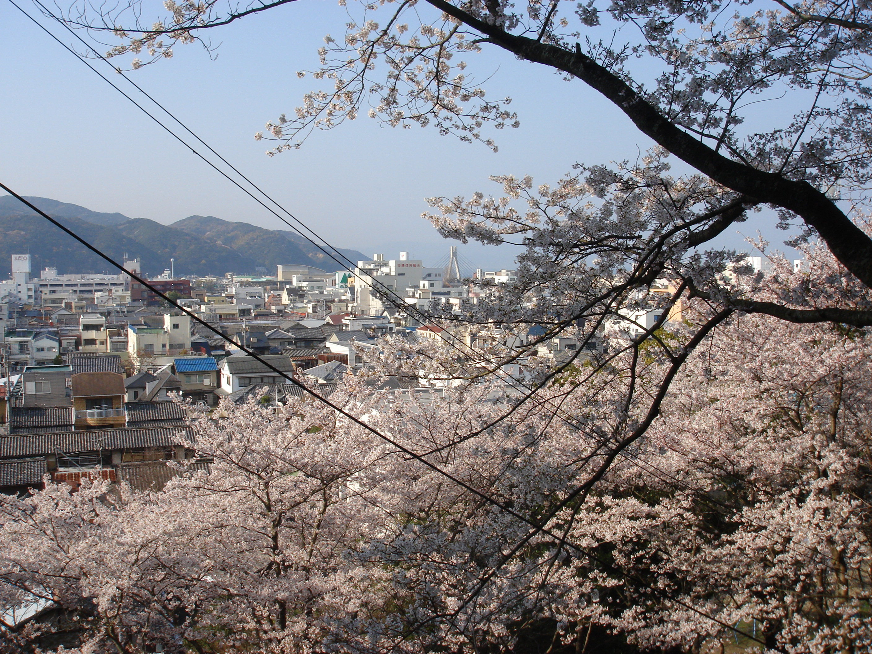 曲田山のソメイヨシノと、市街地を眺める